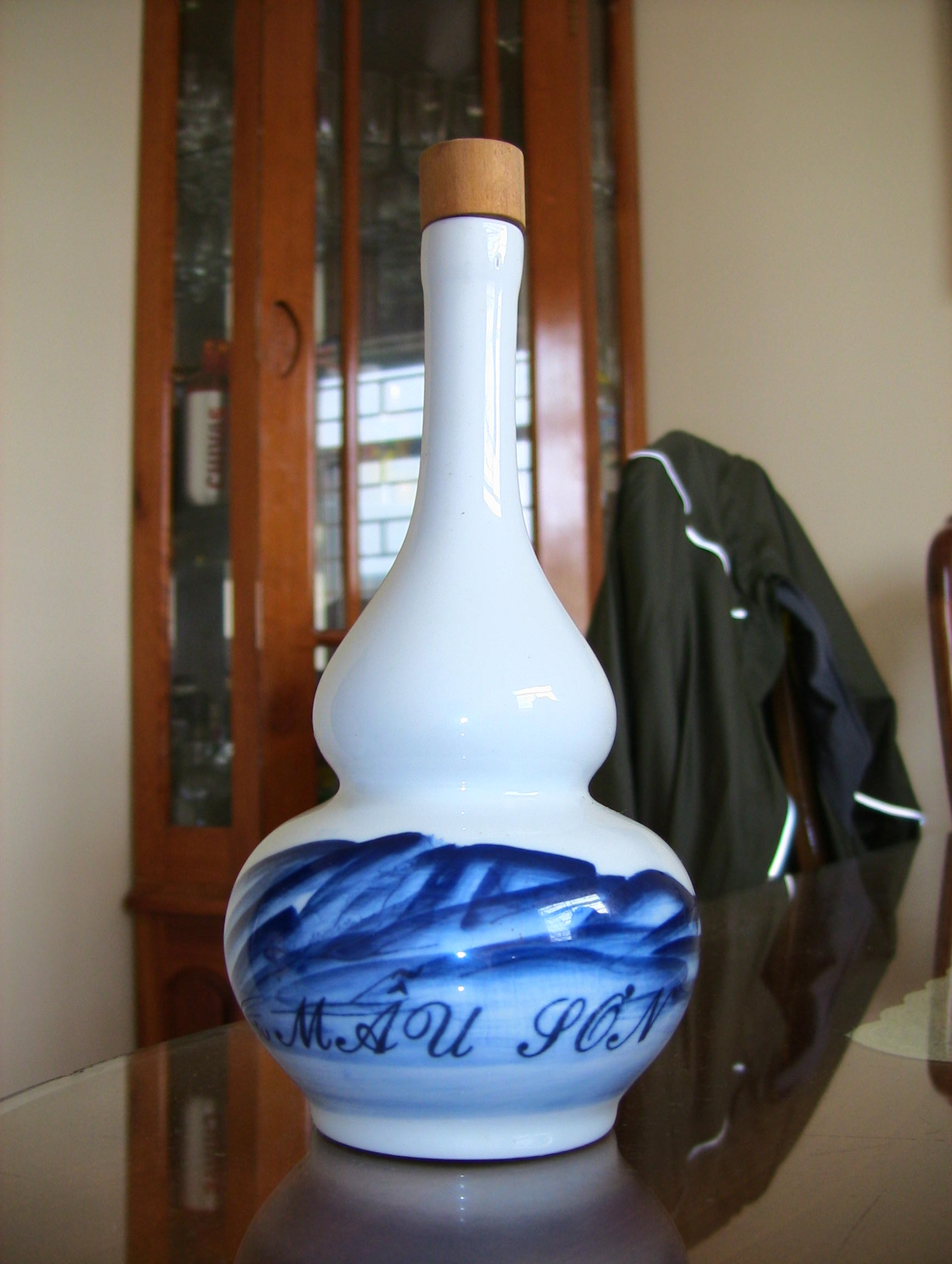 Rượu Mẫu Sơn (độ cồn: 29, dung tích: 500 ml)